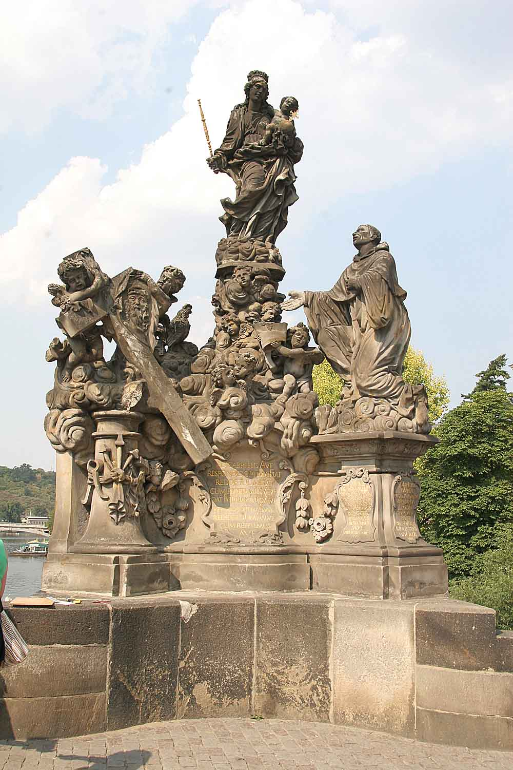 Česky: Sousoší Madony a Sv. Bernarda na Karlově mostě